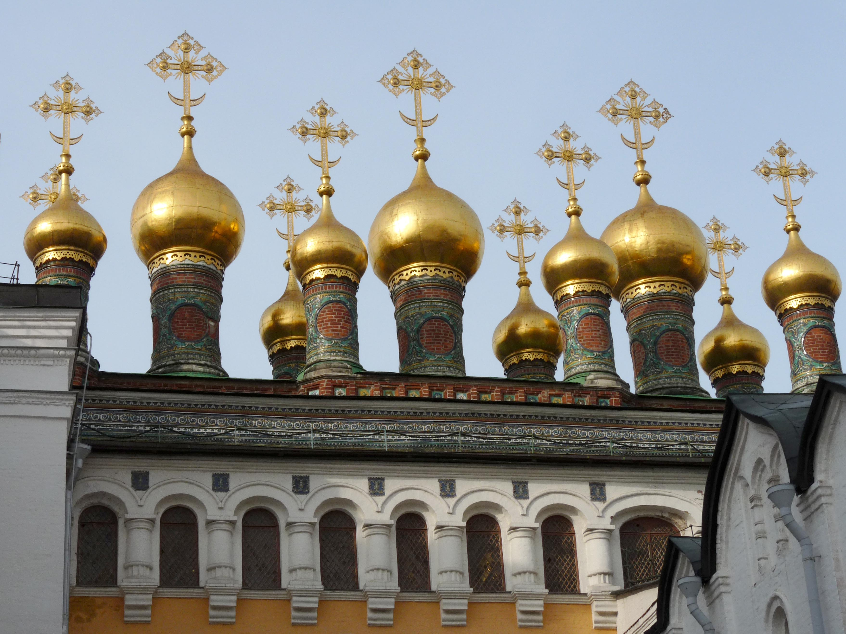 Moscow Kremlin Terem Palace Church 02